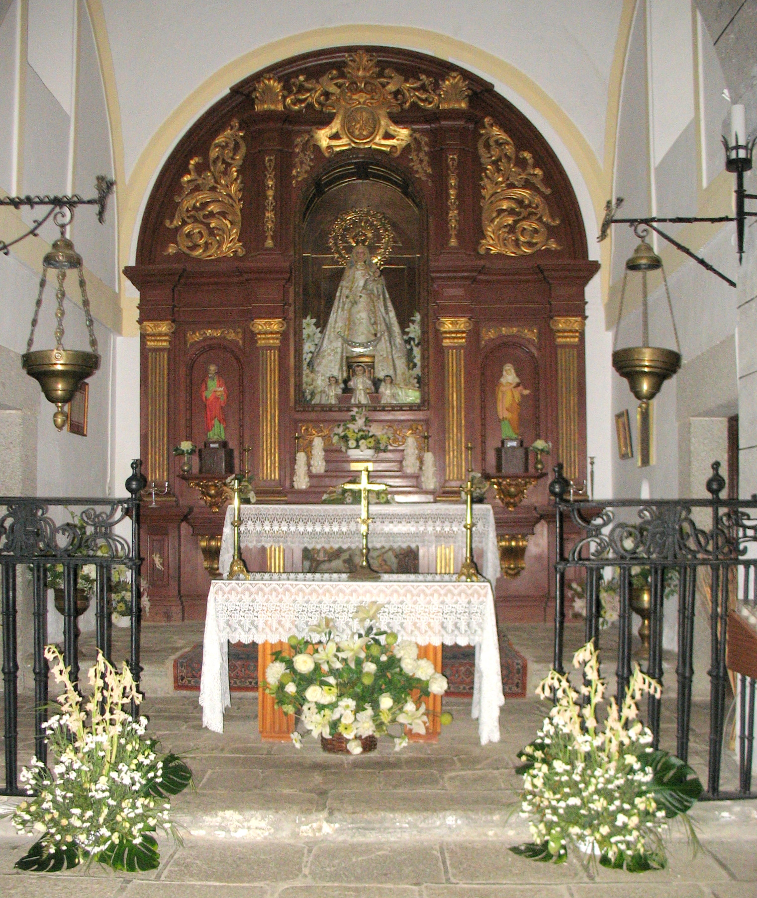 Ermita de Navahonda (Robledo de Chavela, Comunidad de Madrid, España)